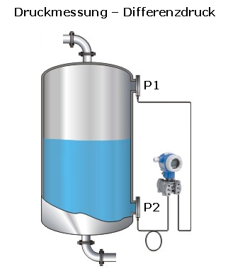 Skizze Differenzdruck Messanordnung